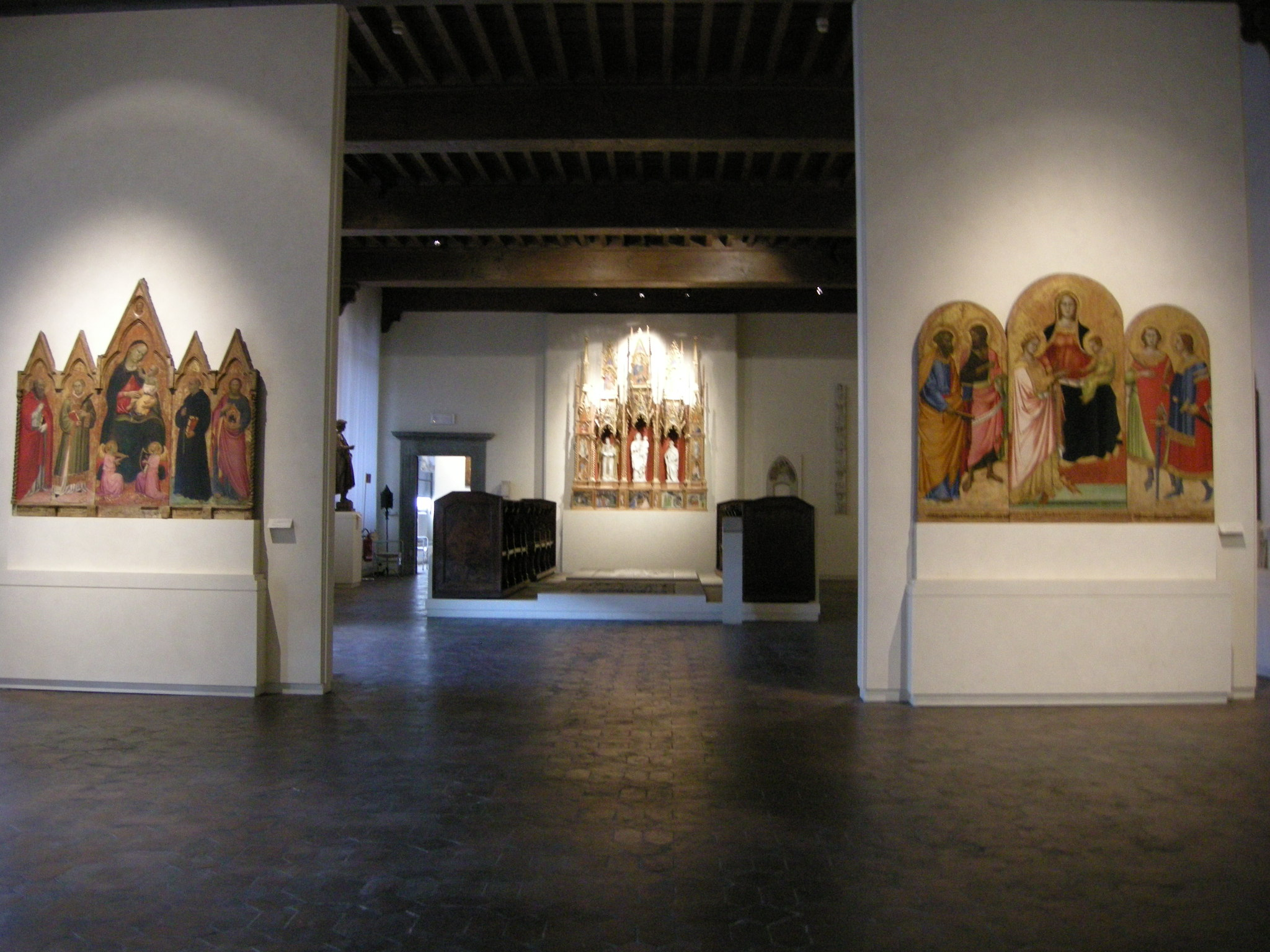 Museo Nazionale di Villa Guinigi, sala